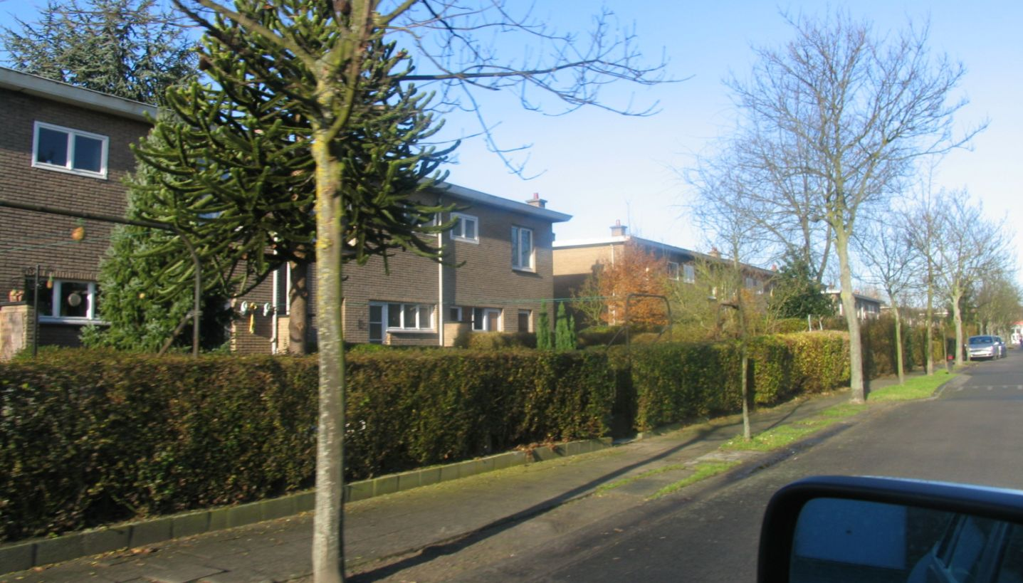 Zicht op de Koekoekstraat noordwaarts, 25 december 2005, foto : Marc Alcide